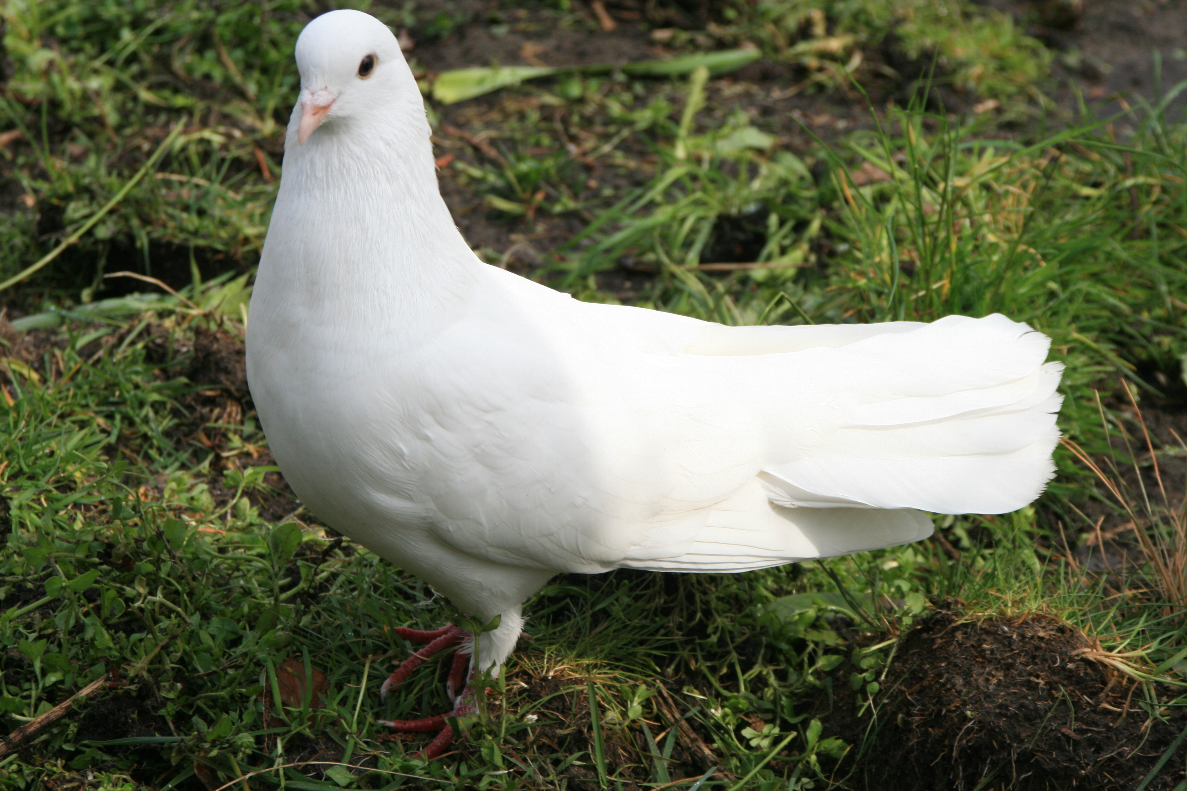 Witte duif